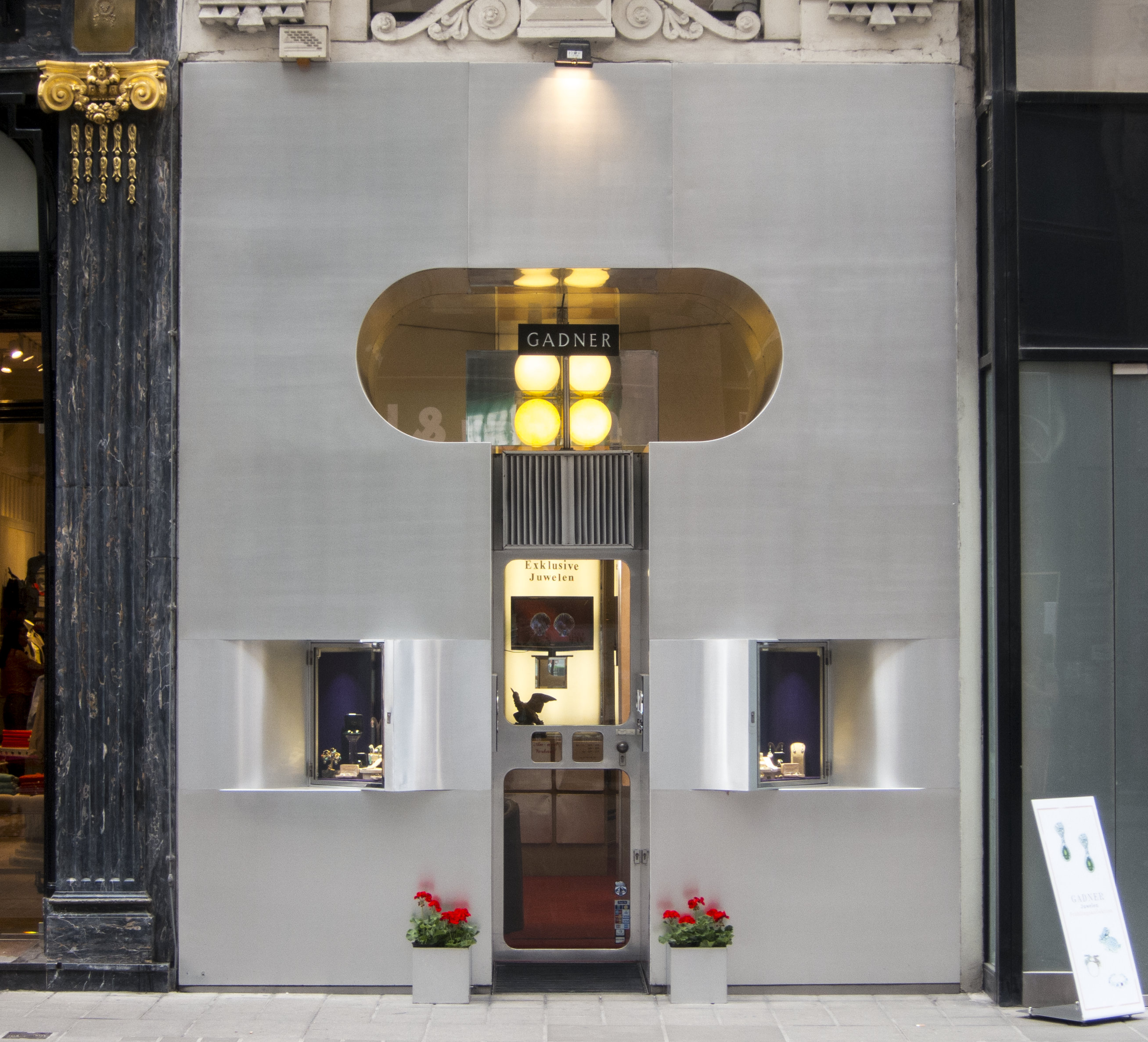 Kohlmarkt 8-10, Vienna